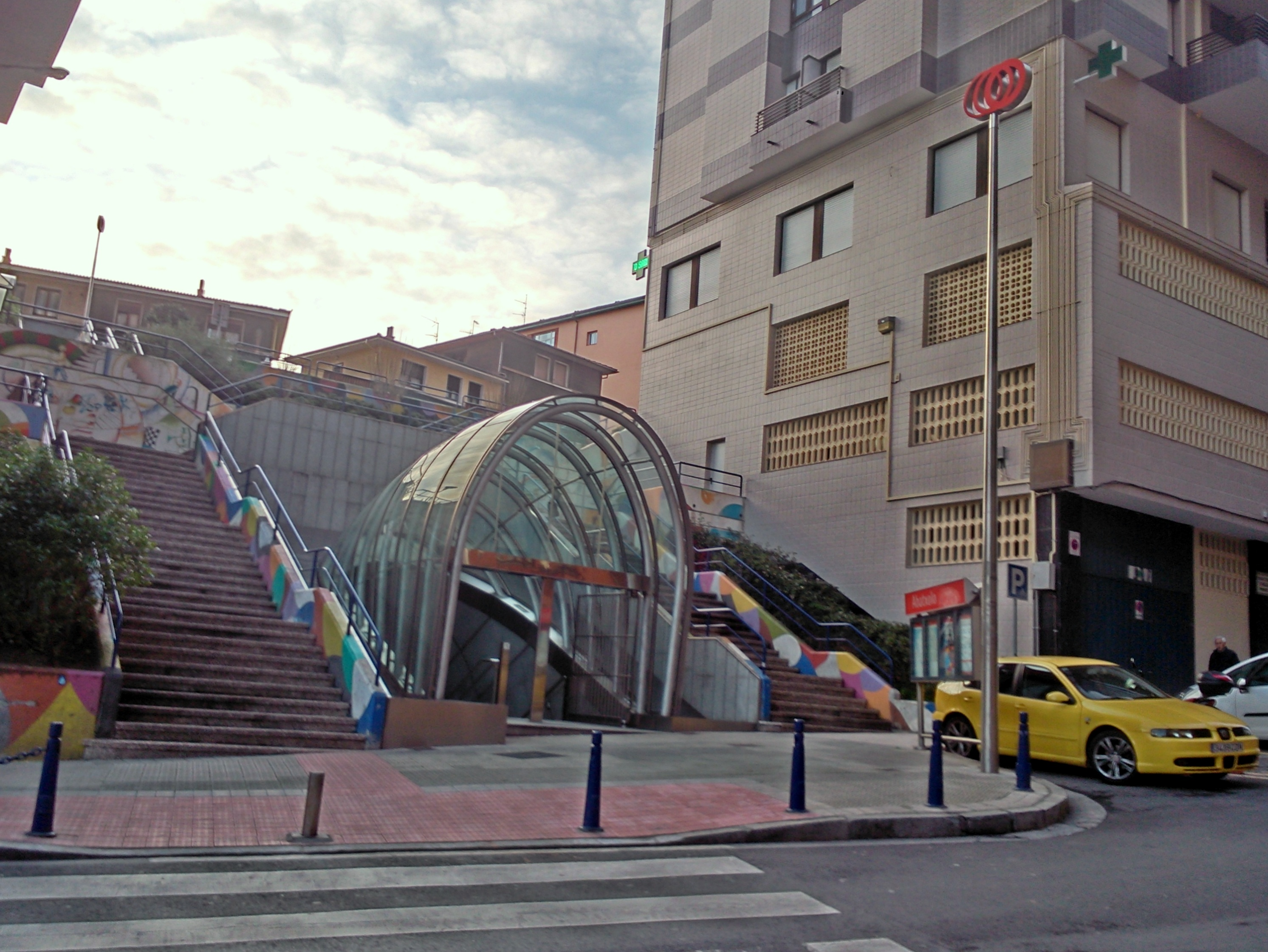 Abatxoloko metro geltokia, Los Palangreros sarbidea